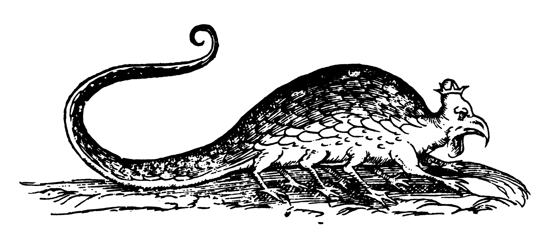 Ein Basiliskenbild aus dem Serpentum et draconum historiae von Ulisse Aldrovandi